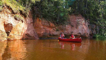 Kevadine retk Ahja jõel. Kuradikoobas.